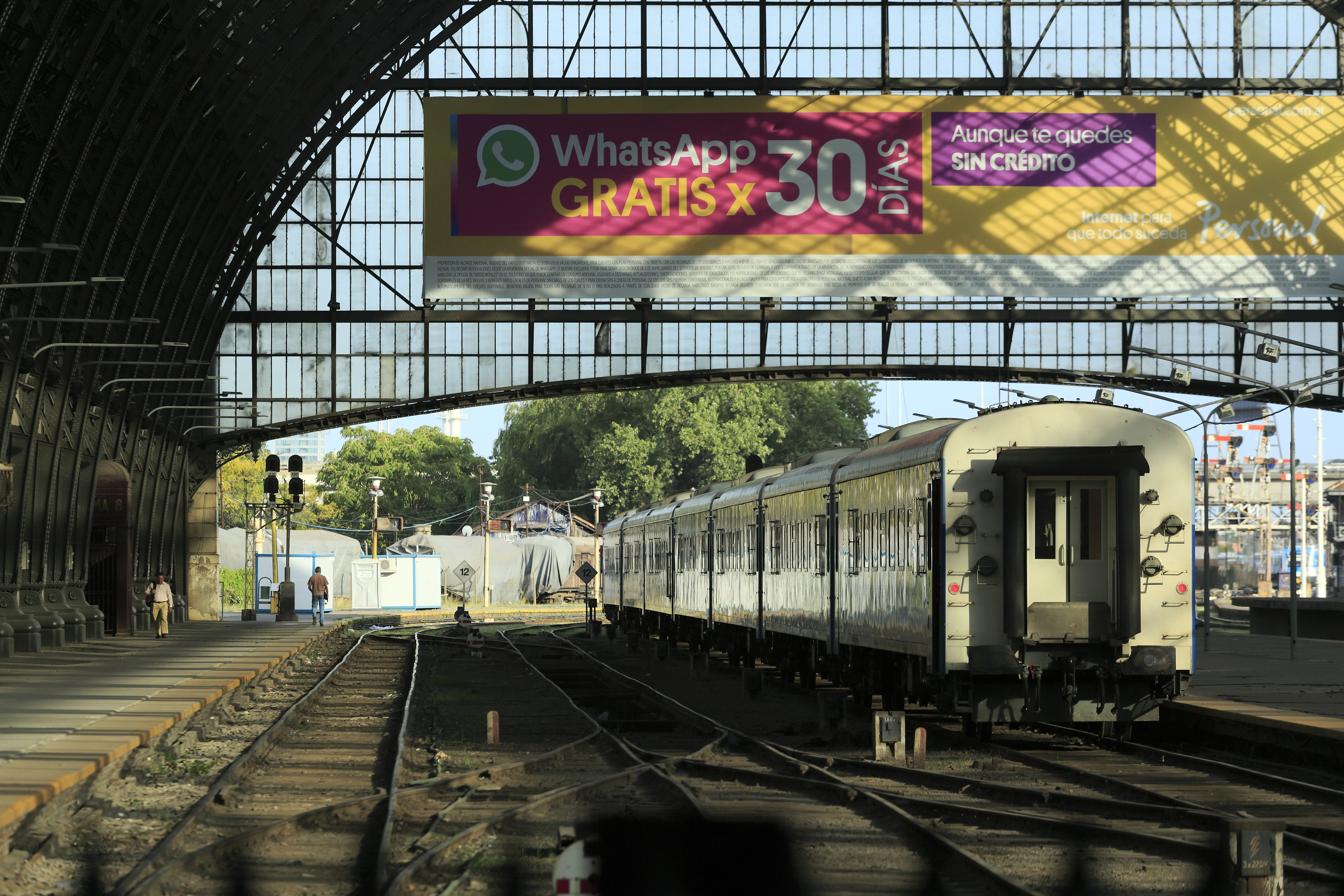 Fernverkehrsbahnsteige 7 und 8, zwischen ihnen liegt ein zusätzliches Lokomotivverkehrs- und Umsetzgleis. Am Vormittag des 28. Februars 2018 steht doch mal ein Reisezug auf dem Gleis 7, außerdem läuft am Zugschluss ein Sitzwagen mit nur nach hinten sichtbaren Schlusssignallampen.